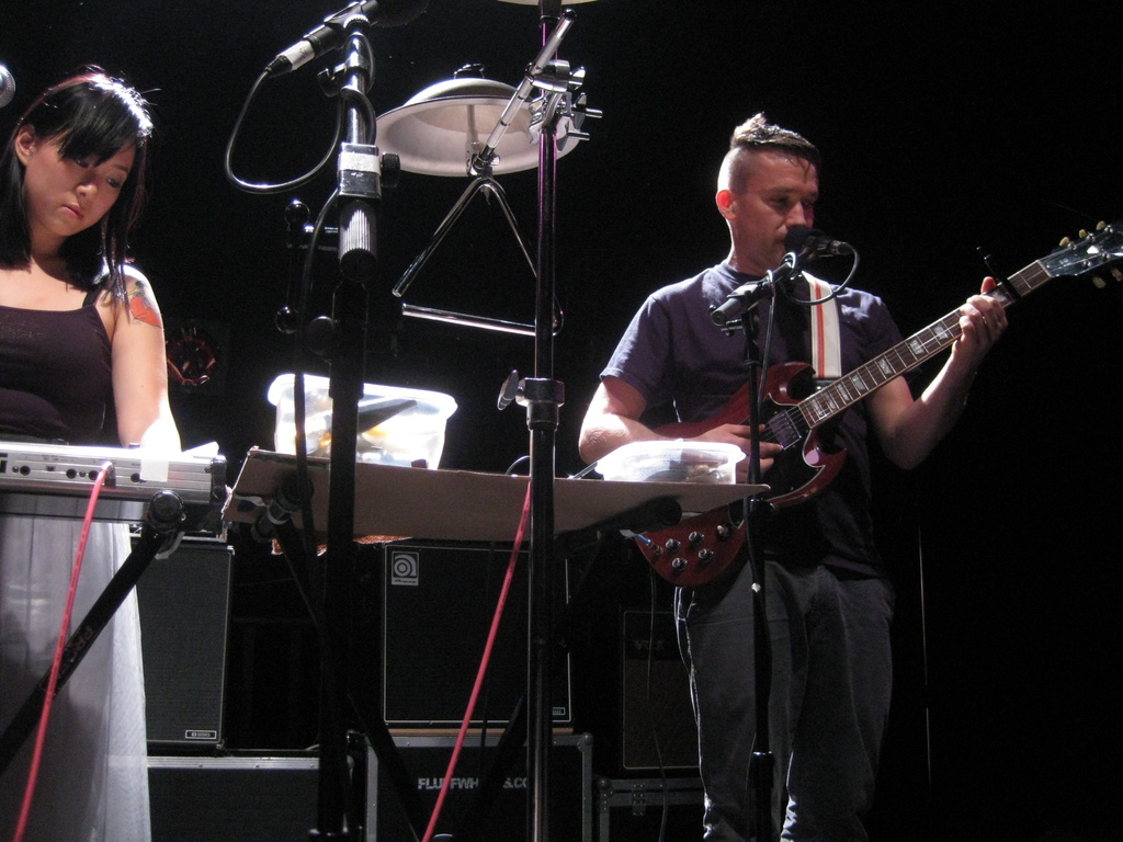 Hebbel am Ufer / Berlin / May 22nd 2010